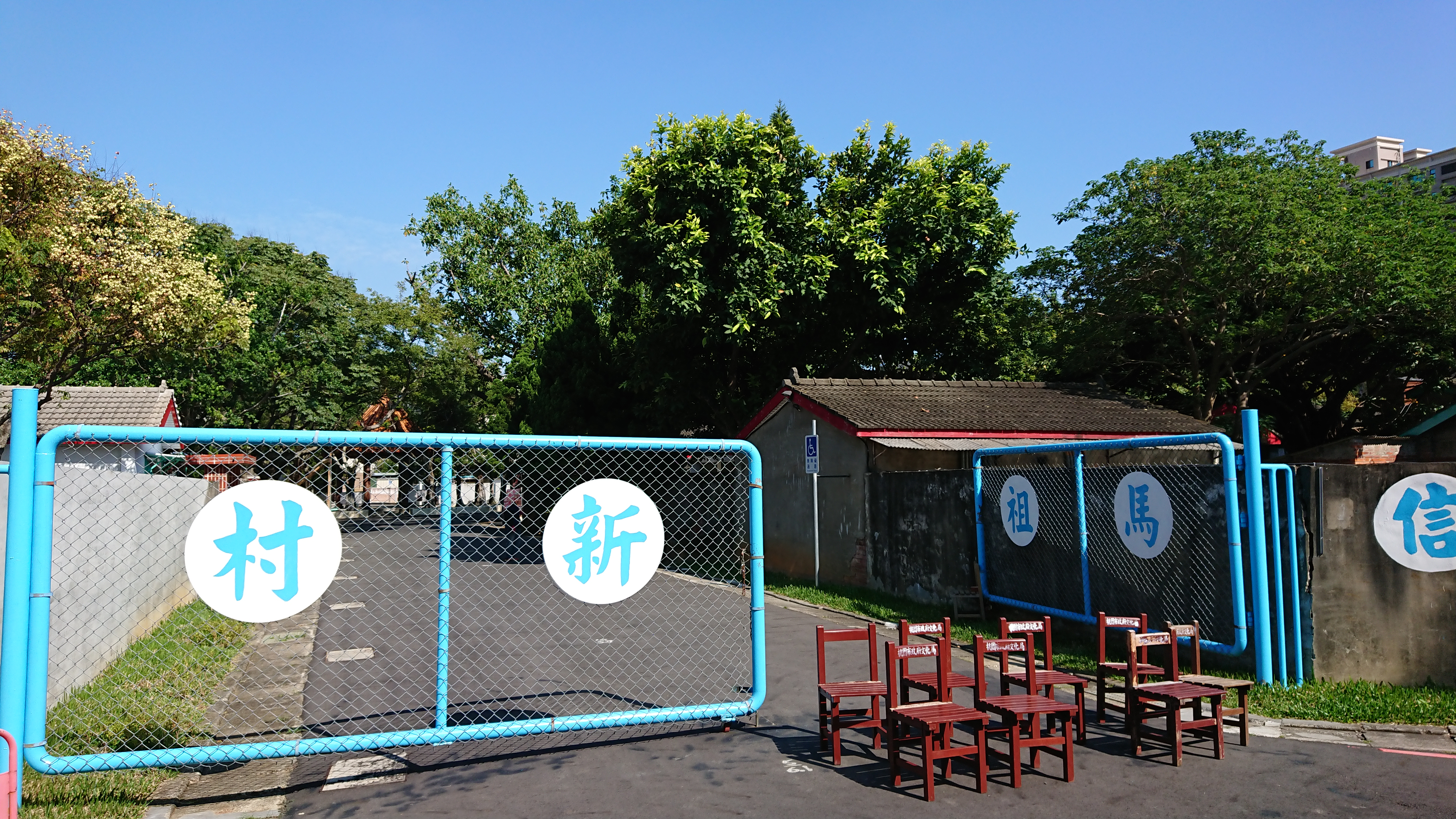 中壢區馬祖新村-大門